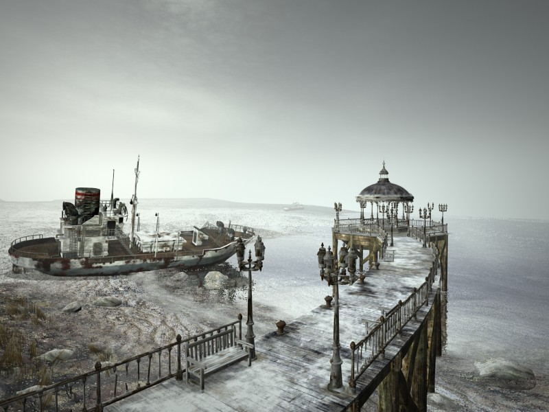 Capture d'écran du jeu vidéo Syberia (2002), développé et édité par Microïds. Vue de la jetée du port de la station thermale d'Aralbad, ville fictive située dans l'ancienne URSS, au bord de la mer d'Aral.